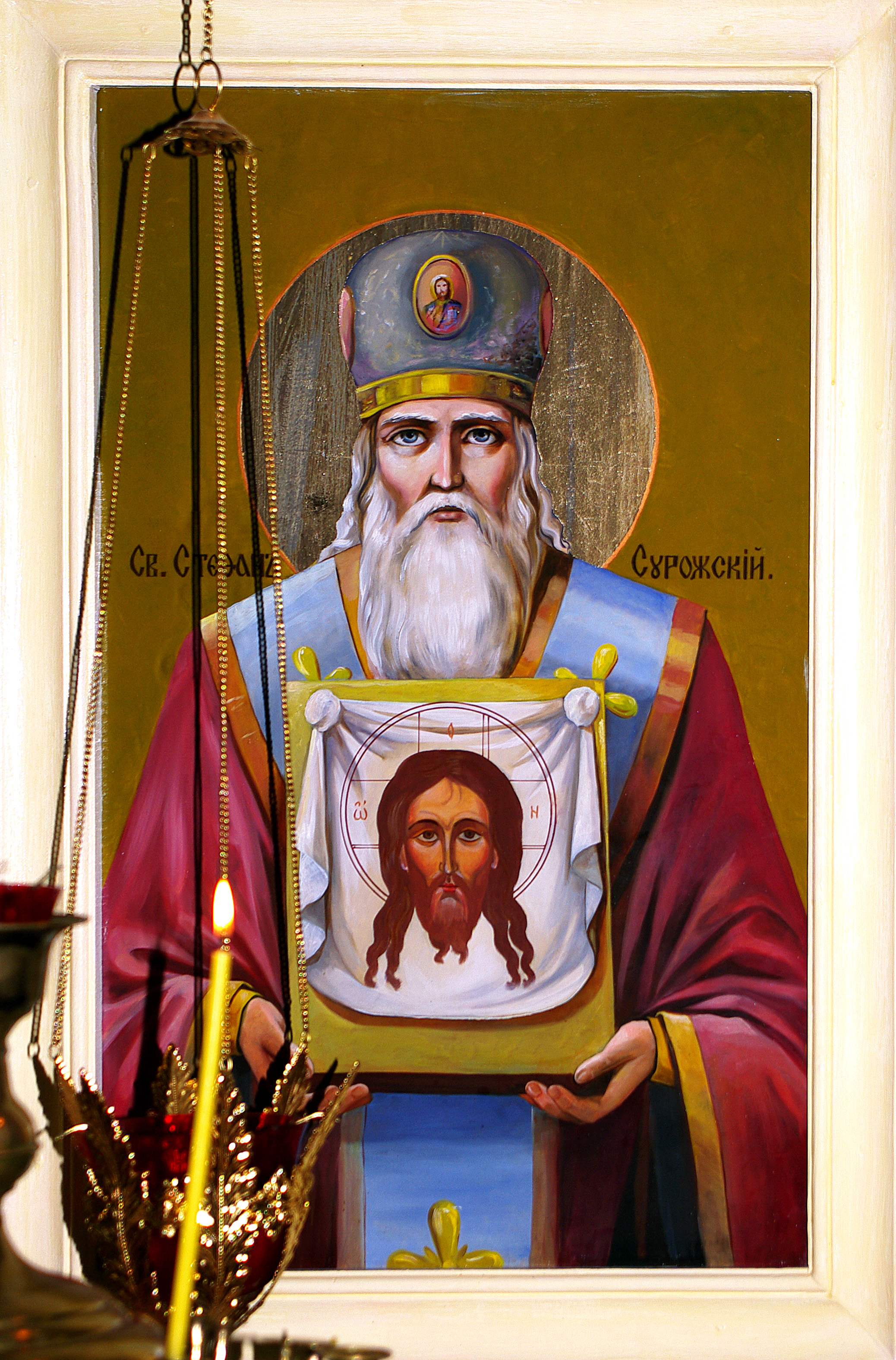 иконный образ святителя Стефана Сурожского в одноименном храме крымского поселка Орджоникидзе